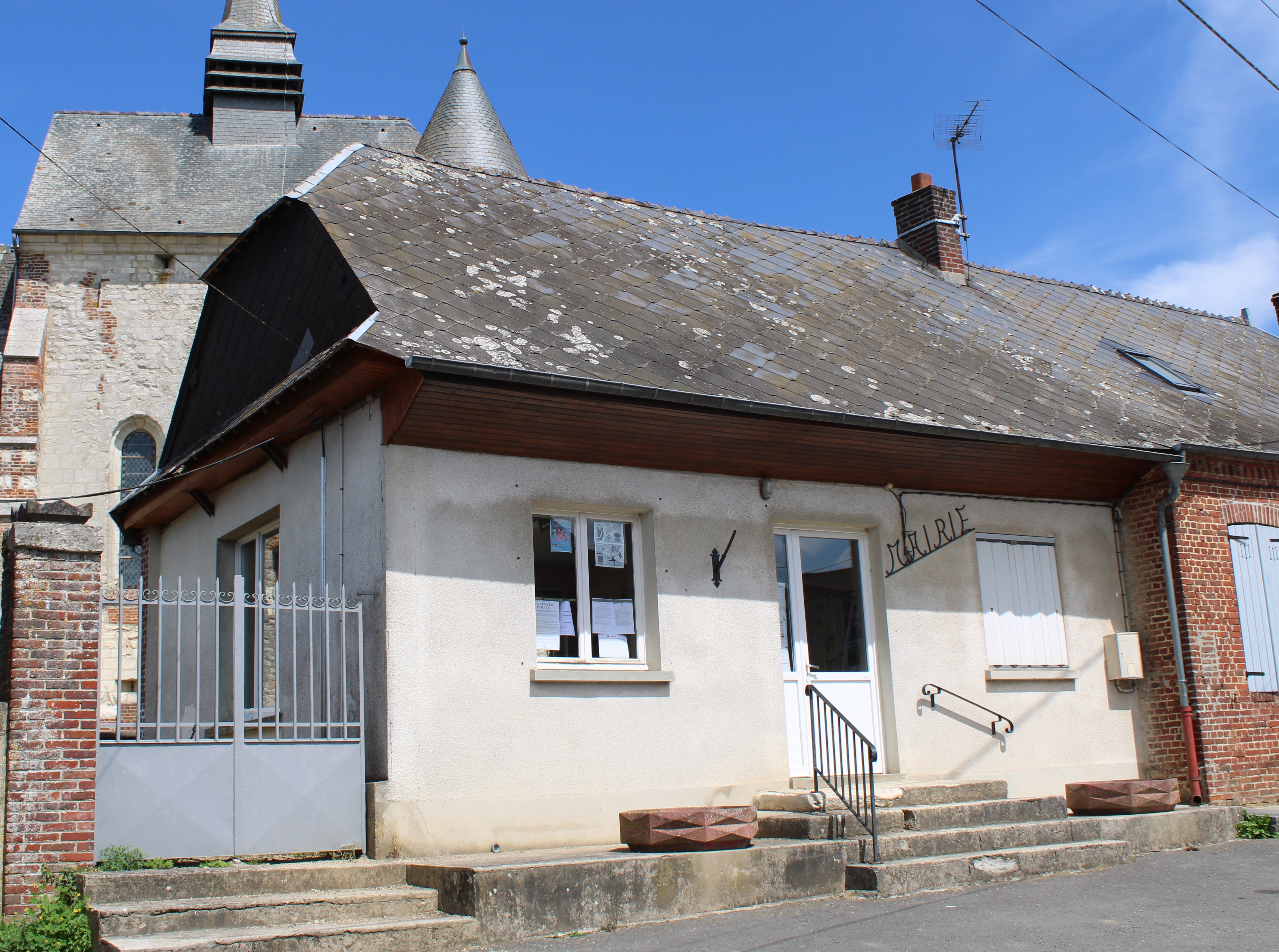 La mairie